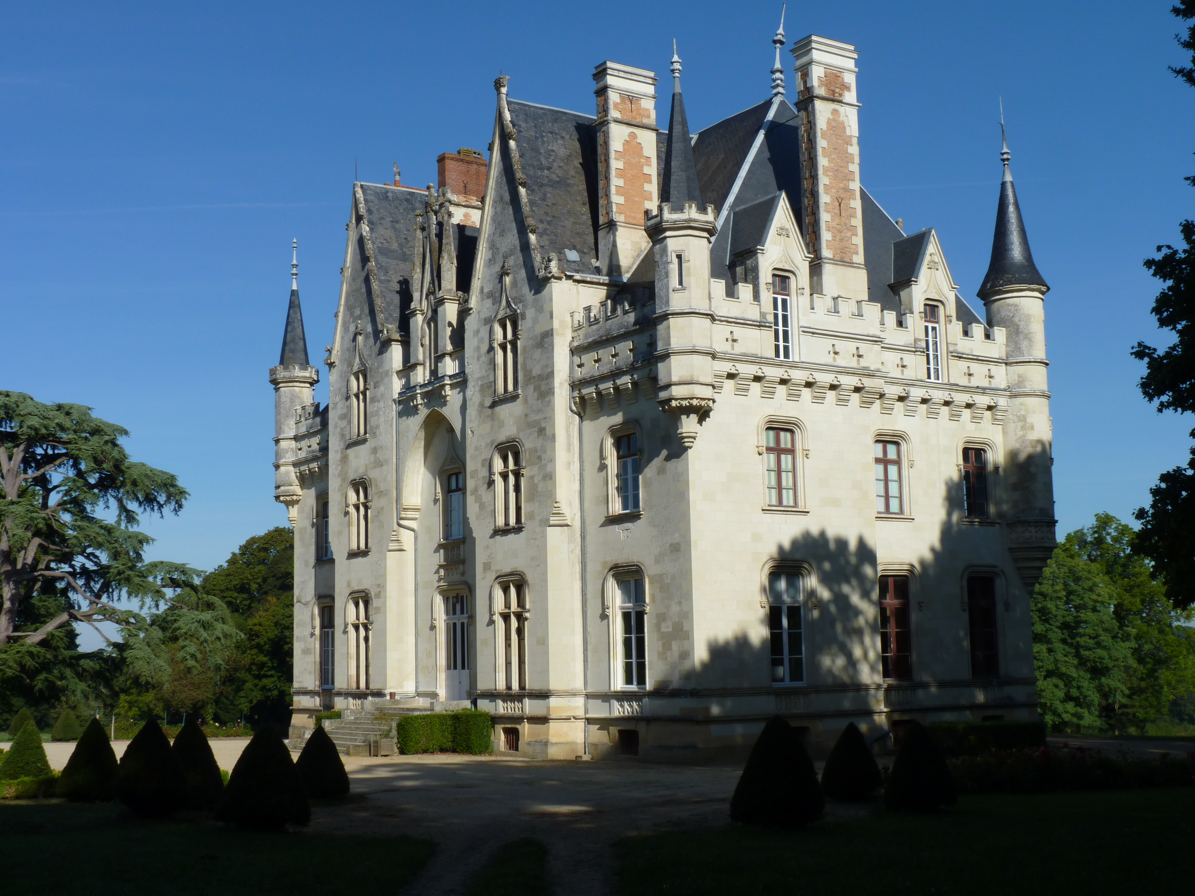 Chateau de Brignac à Seiches-sur-le-Loir (Maine-et-Loire, France).